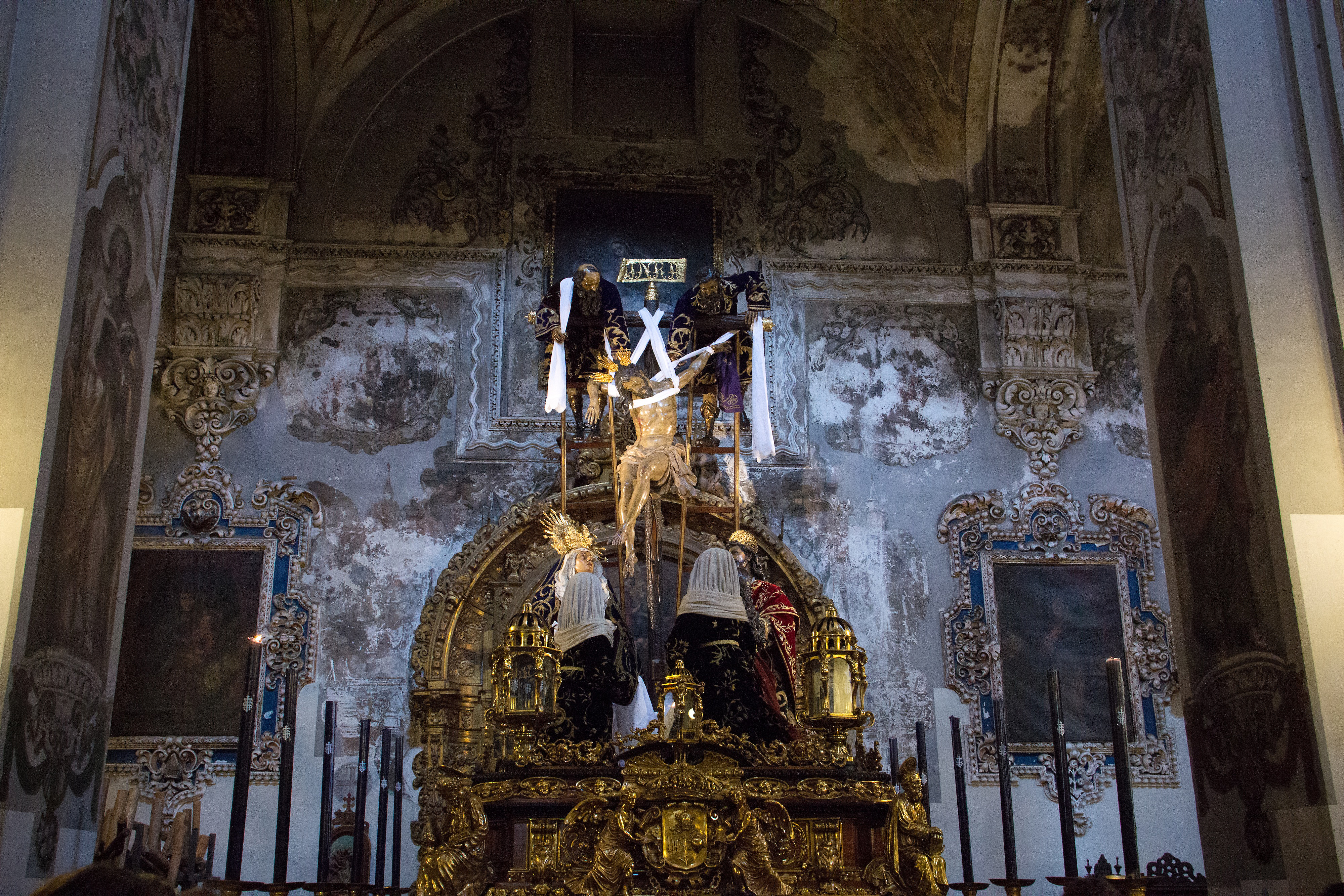 Paso de la Quinta Angustia. Iglesia de la Magdalena. Sevilla